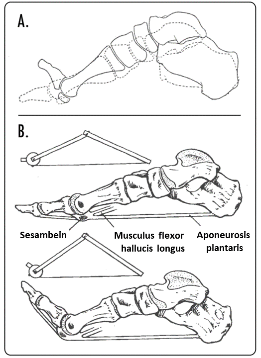 Plantar Bewegung.